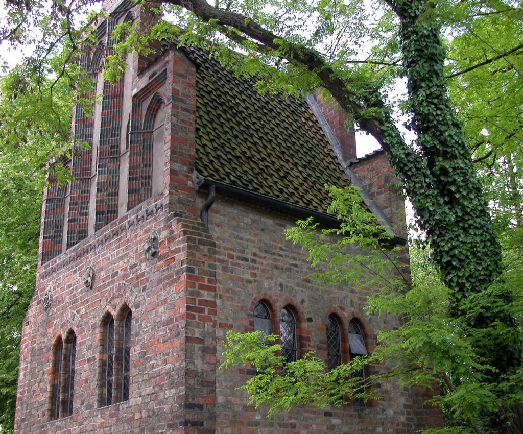 Braunschweig: Liberei, Gesamtansicht von Südosten